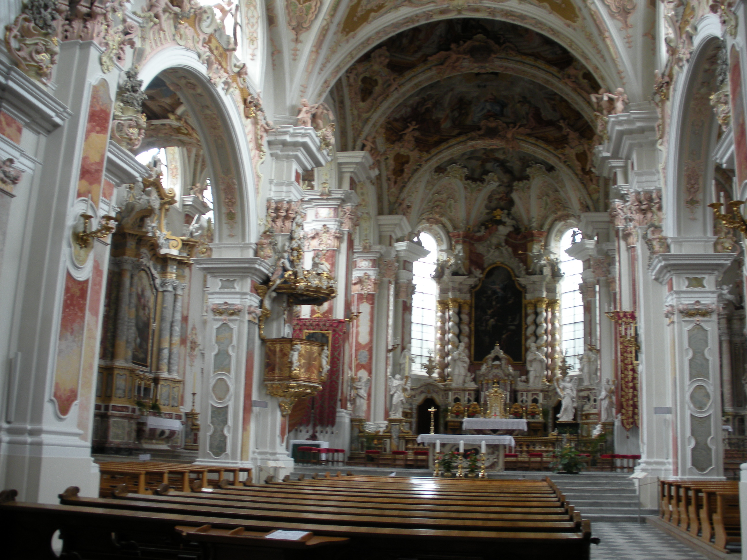 Abbazia di Novacella (Varna, BZ), interno della chiesa Foto propria Luglio 2009